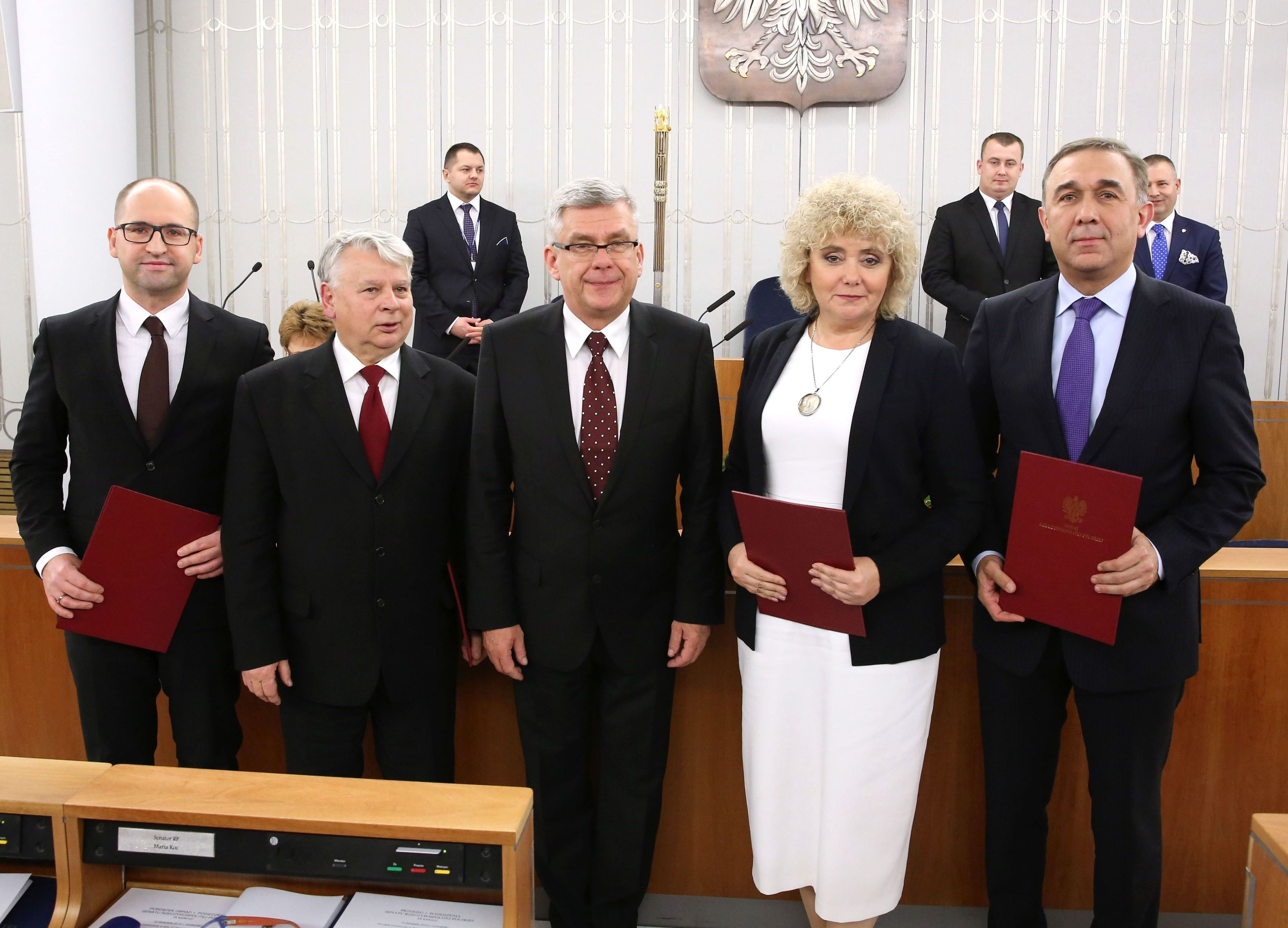 Adam Bielan, Bogdan Borusewicz, Stanisław Karczewski, Maria Koc i Grzegorz Czelej